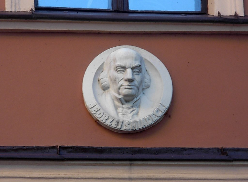 Jezuicka 2 Bydgoszcz - medalion Jędrzej Śniadecki